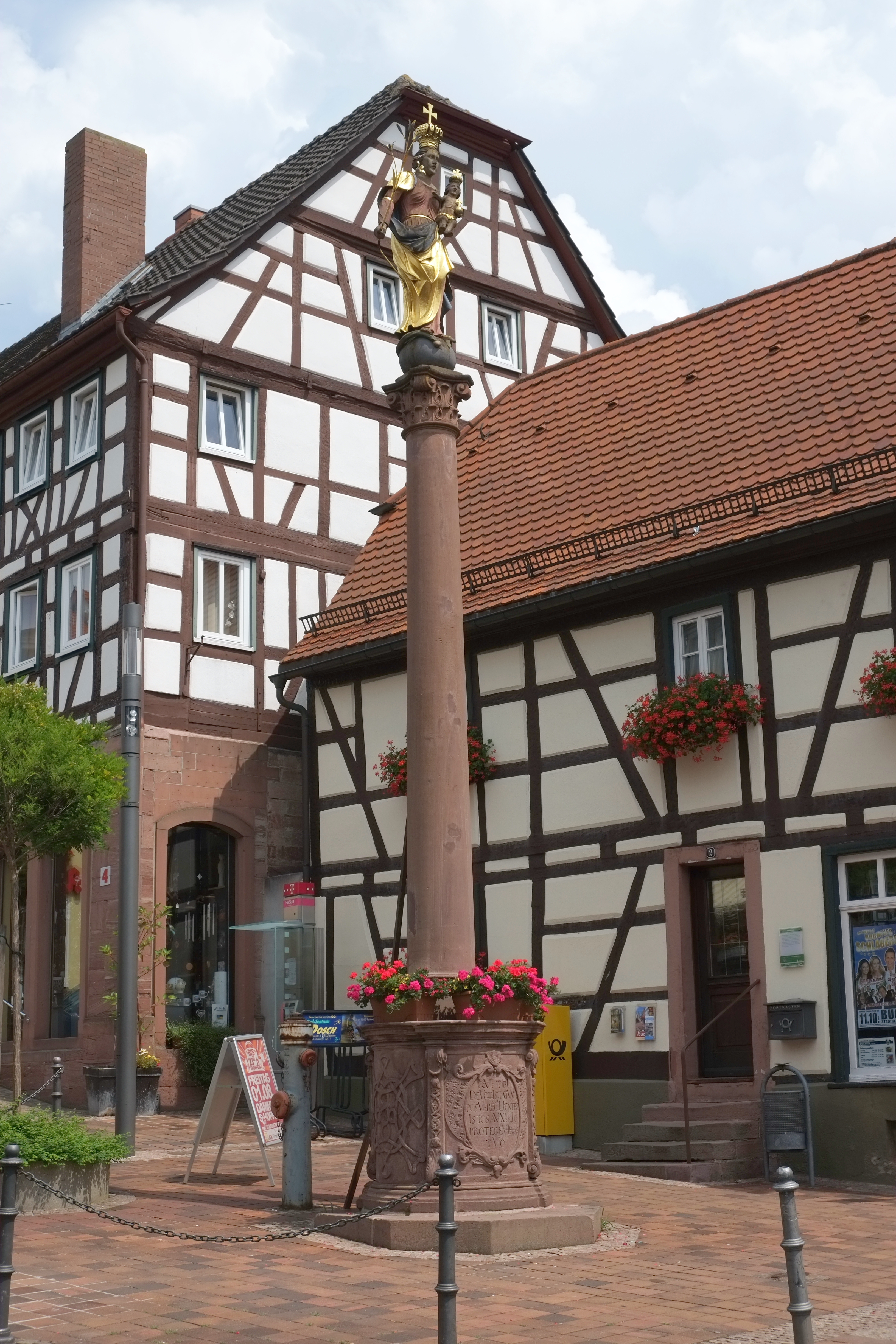 Mariensäule (gegenüber Hochstadtstraße) in Buchen (Odenwald) im Neckar-Odenwald-Kreis (Baden-Württemberg, Deutschland)